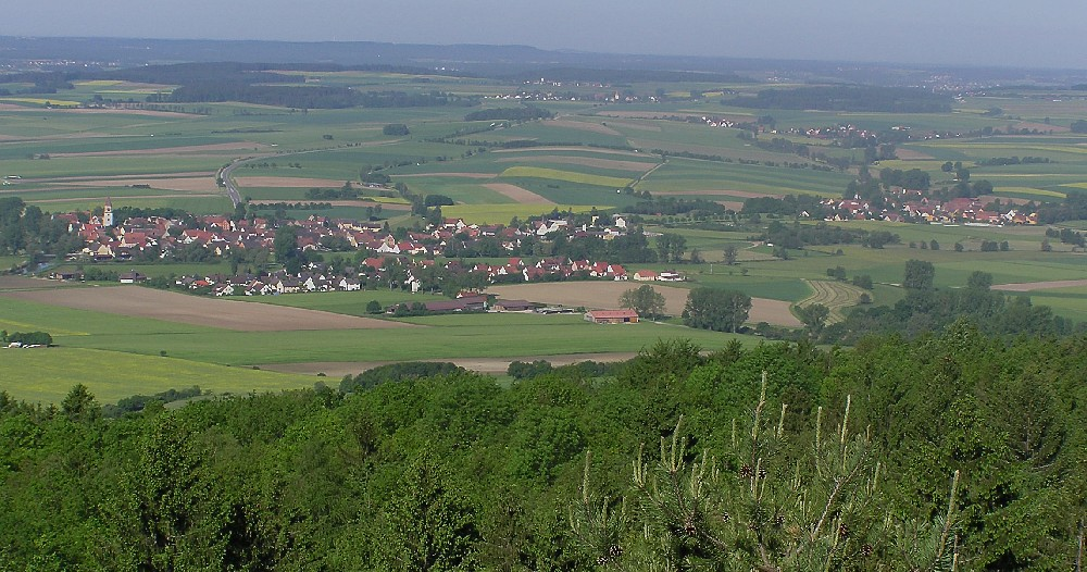 Wittelshofen vom Hesselberg Fotograf: Oswald Engelhardt